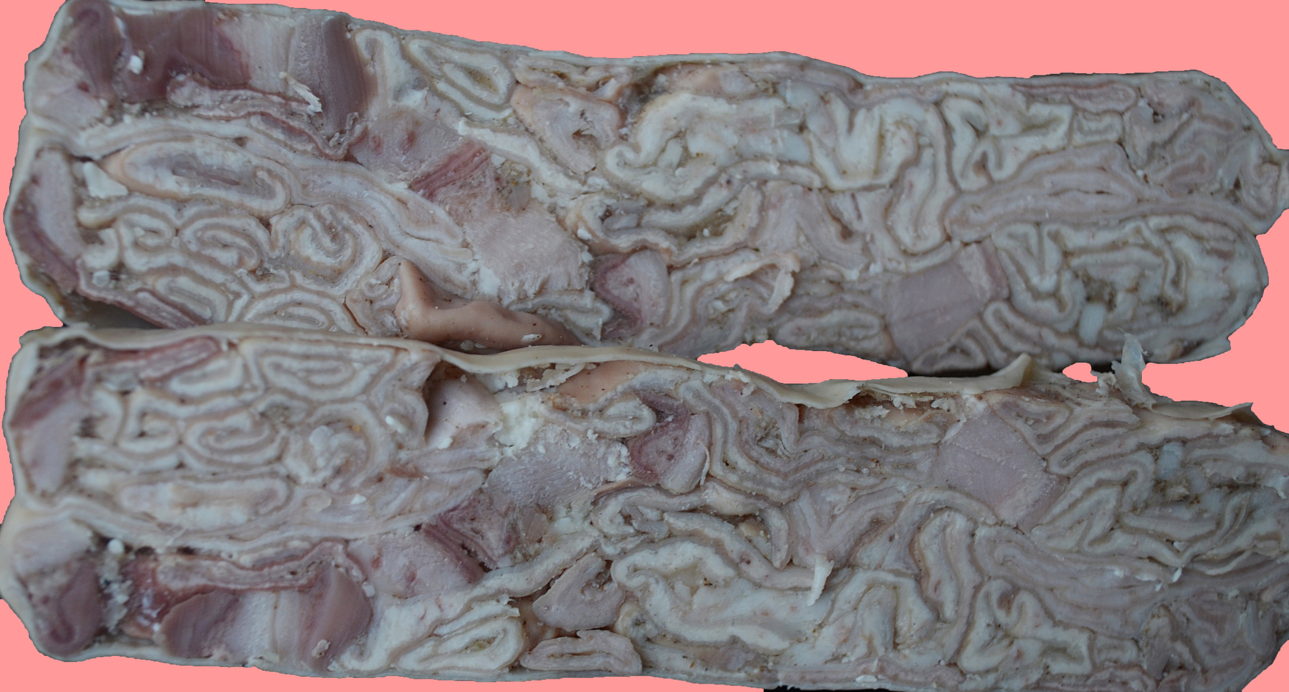 Coupée dans le sens de la longueur, une andouillette AAAAA de chez Christophe Thierry, tirée à la ficelle. Elle répond aux spécifications du Code des usages de la charcuterie (qui accepte également des andouillettes simplement "embossées main" dans cette catégorie).